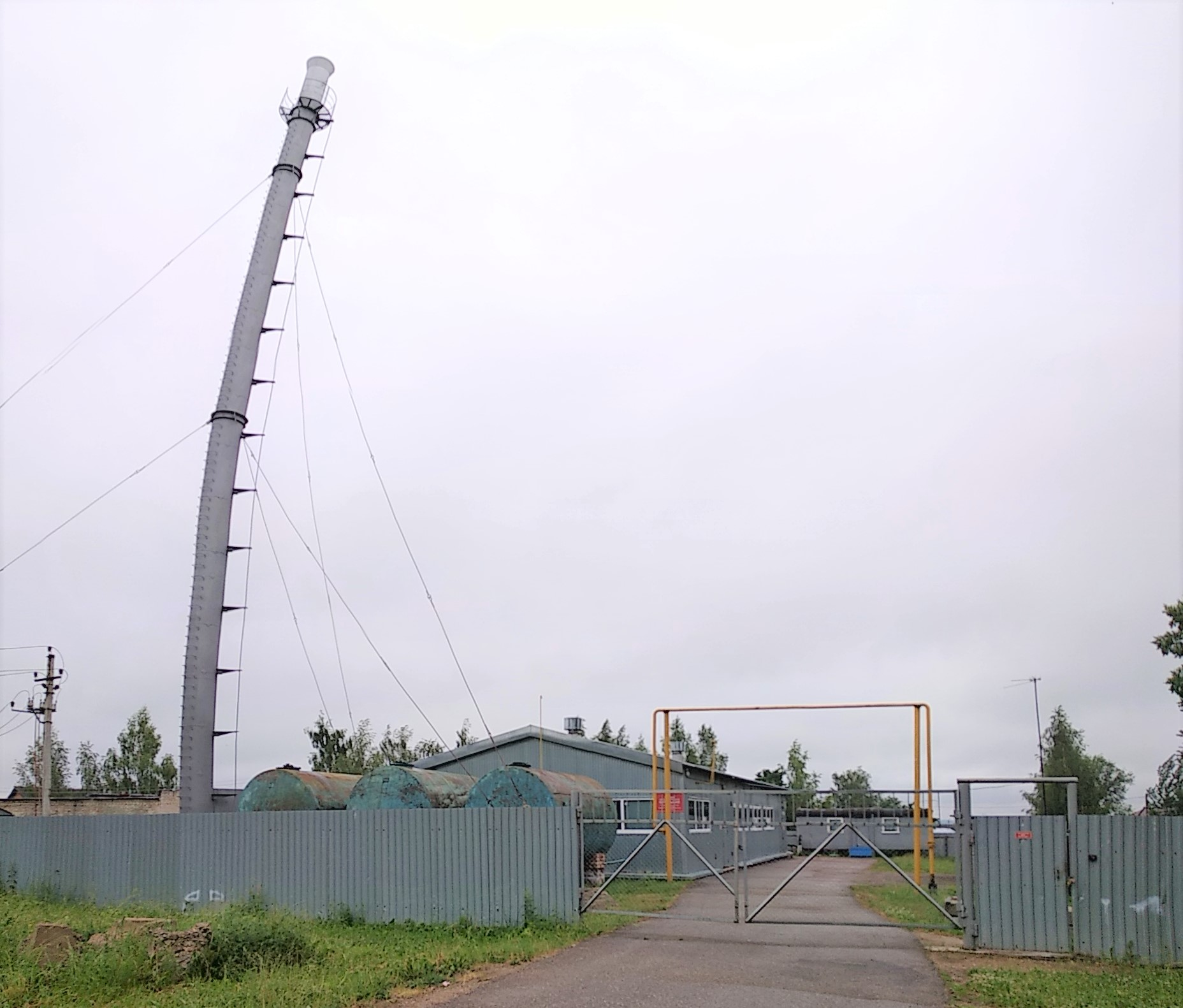 Новая газовая котельная села Шурскол. Открыта 14 ноября 2008 г.